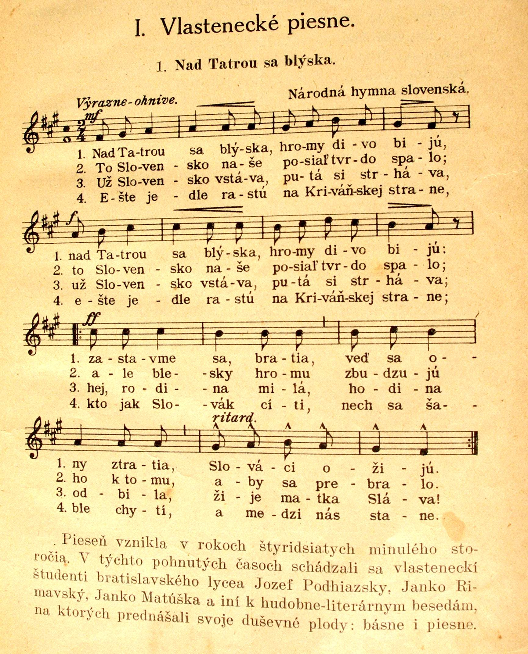 reprodukcia z učebnice Emil Hula: Slovenské kvety, rok vydania 1923